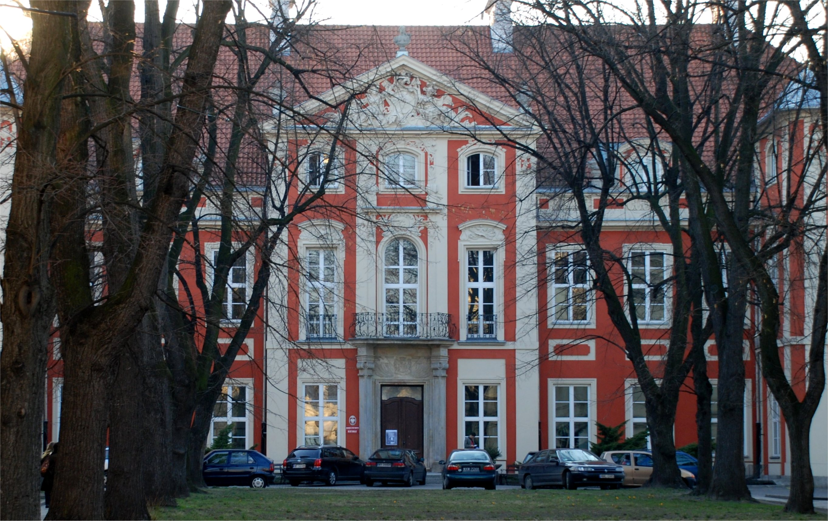 Pałac Czapskich (Akademia Sztuk Pięknych) przy Krakowskim Przedmieściu 5 w Warszawie (fot Zu)